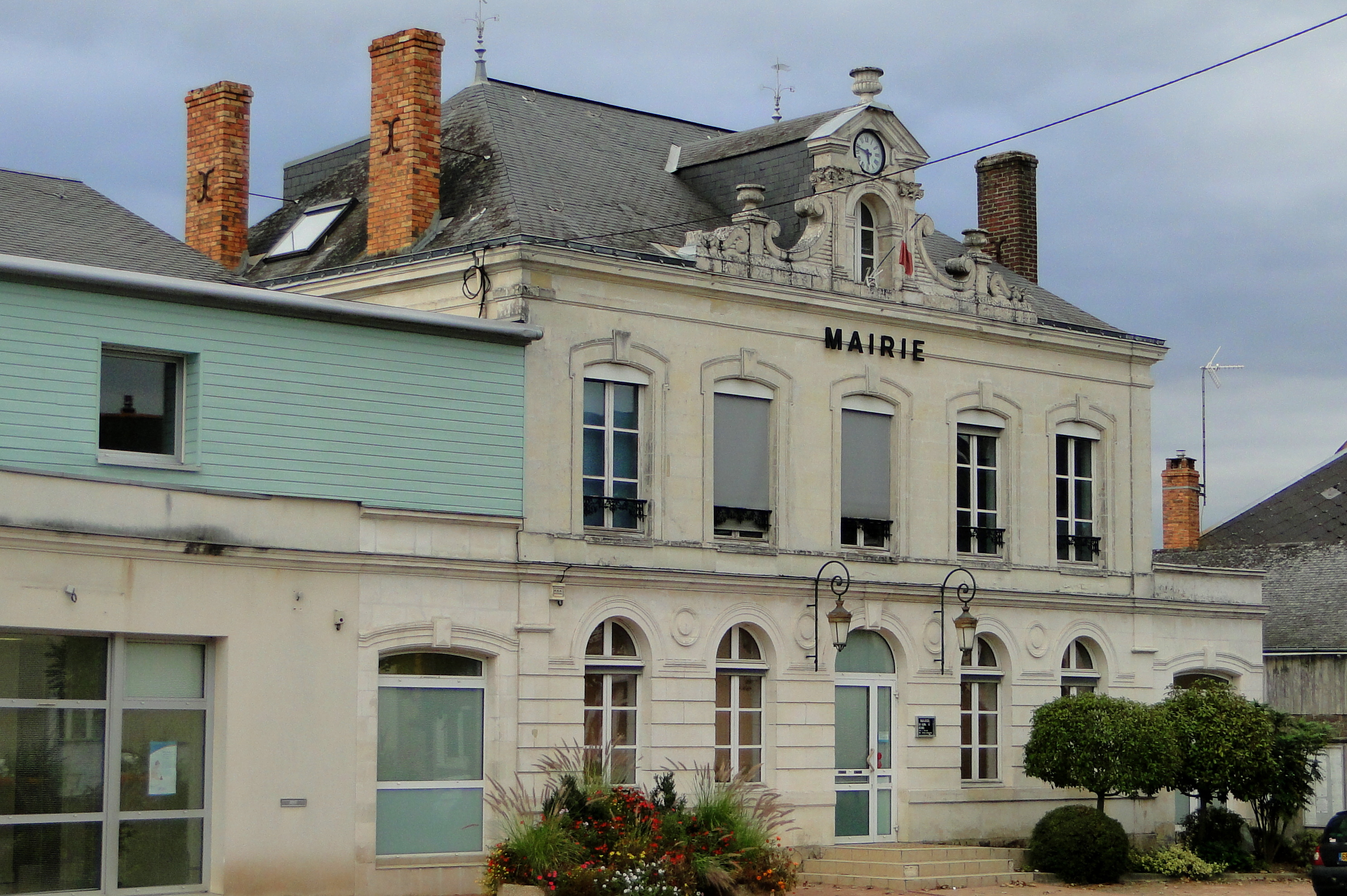 Mairie de Cérans-Foulletourte (Sarthe)